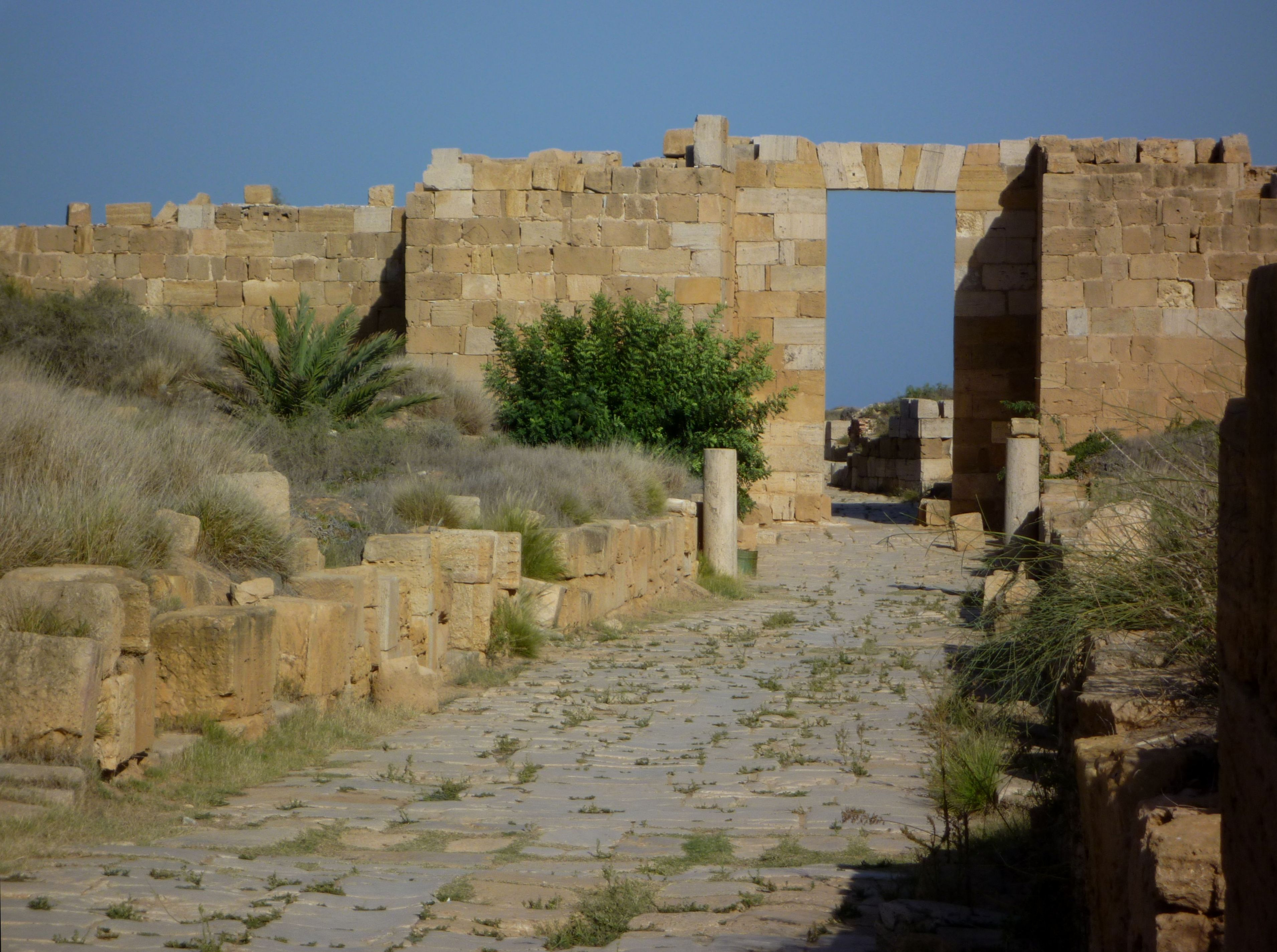 Leptis Magna - Byzantinisches Tor